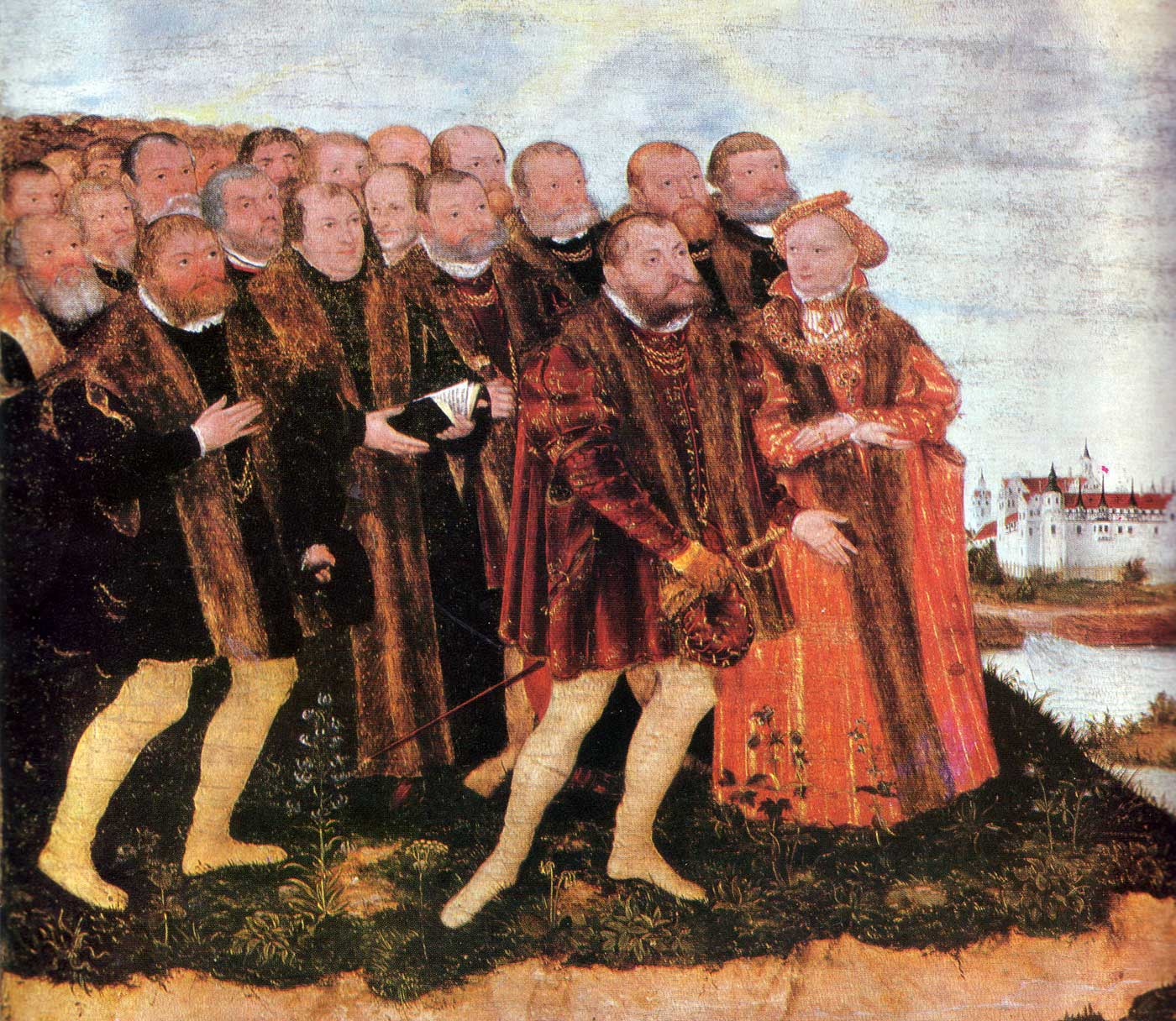 mit dem Porträt Johann von Brandenburg-Küstrin, der als Brautführer seine Schwester Magarete zur Vermählung mit dem Fürsten Johann IV. von Anhalt-Zerbst nach Dessau begleitet.